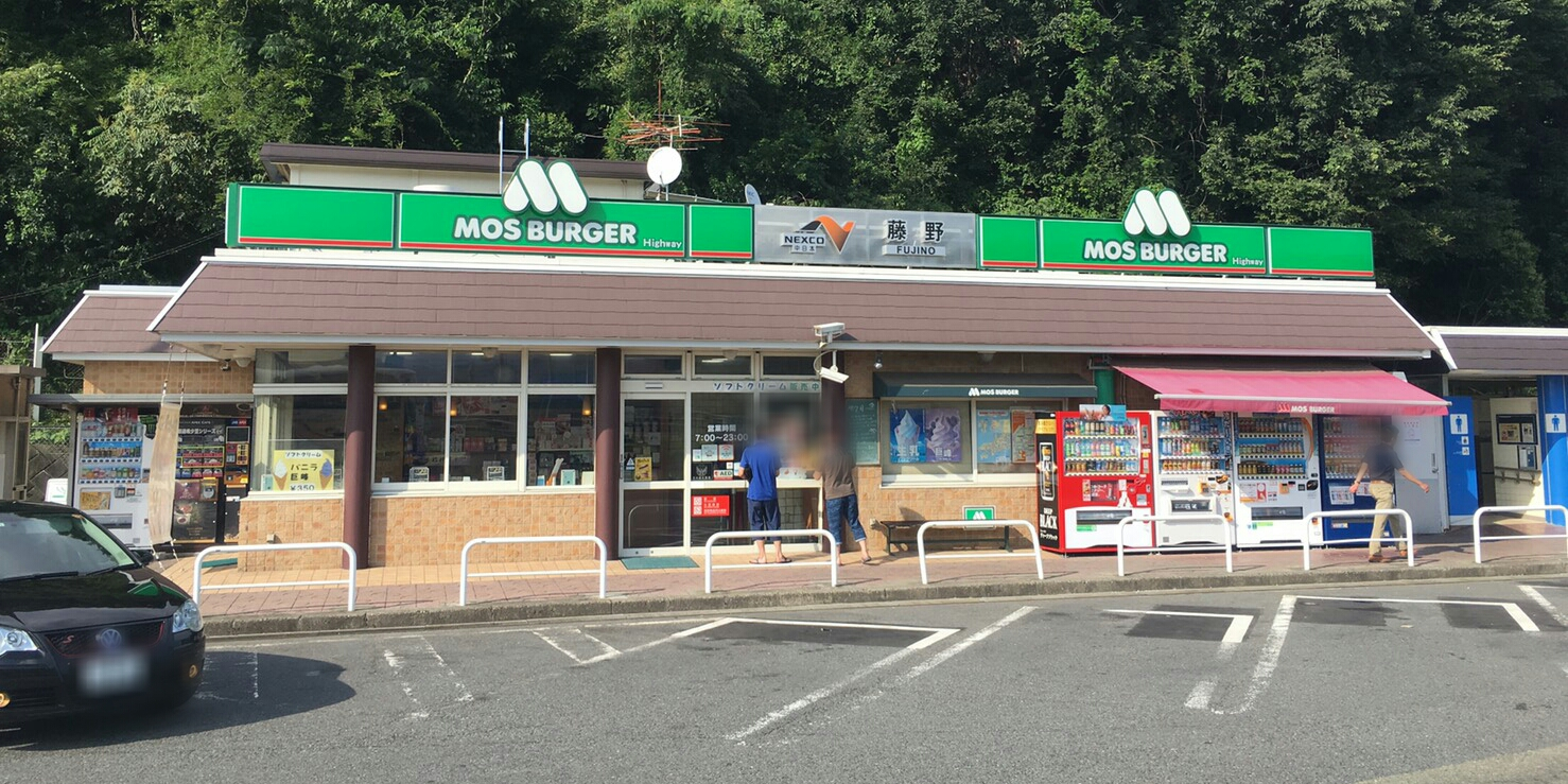 藤野パーキングエリア